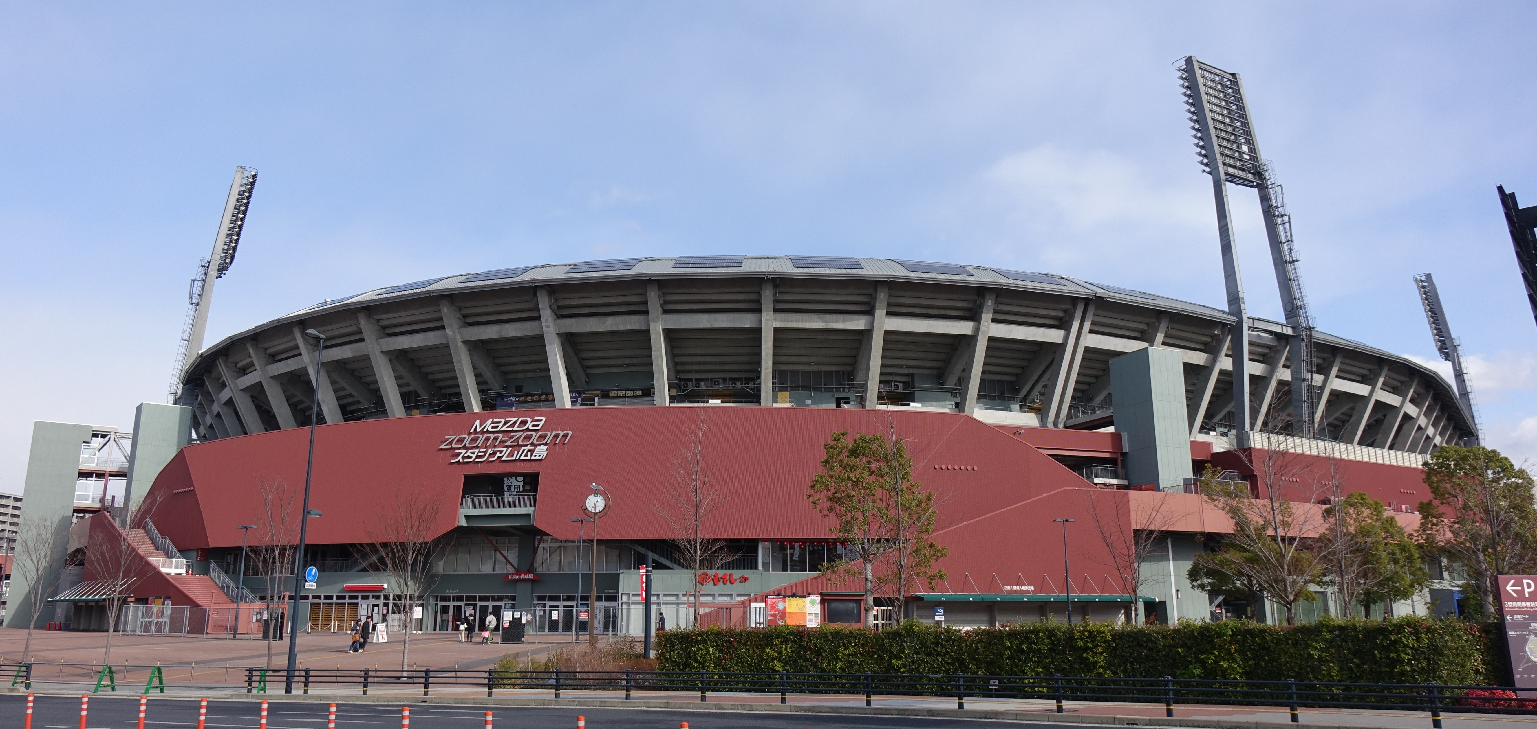 2014年12月22日、MAZDA Zoom-Zoom スタジアムの正面から撮影